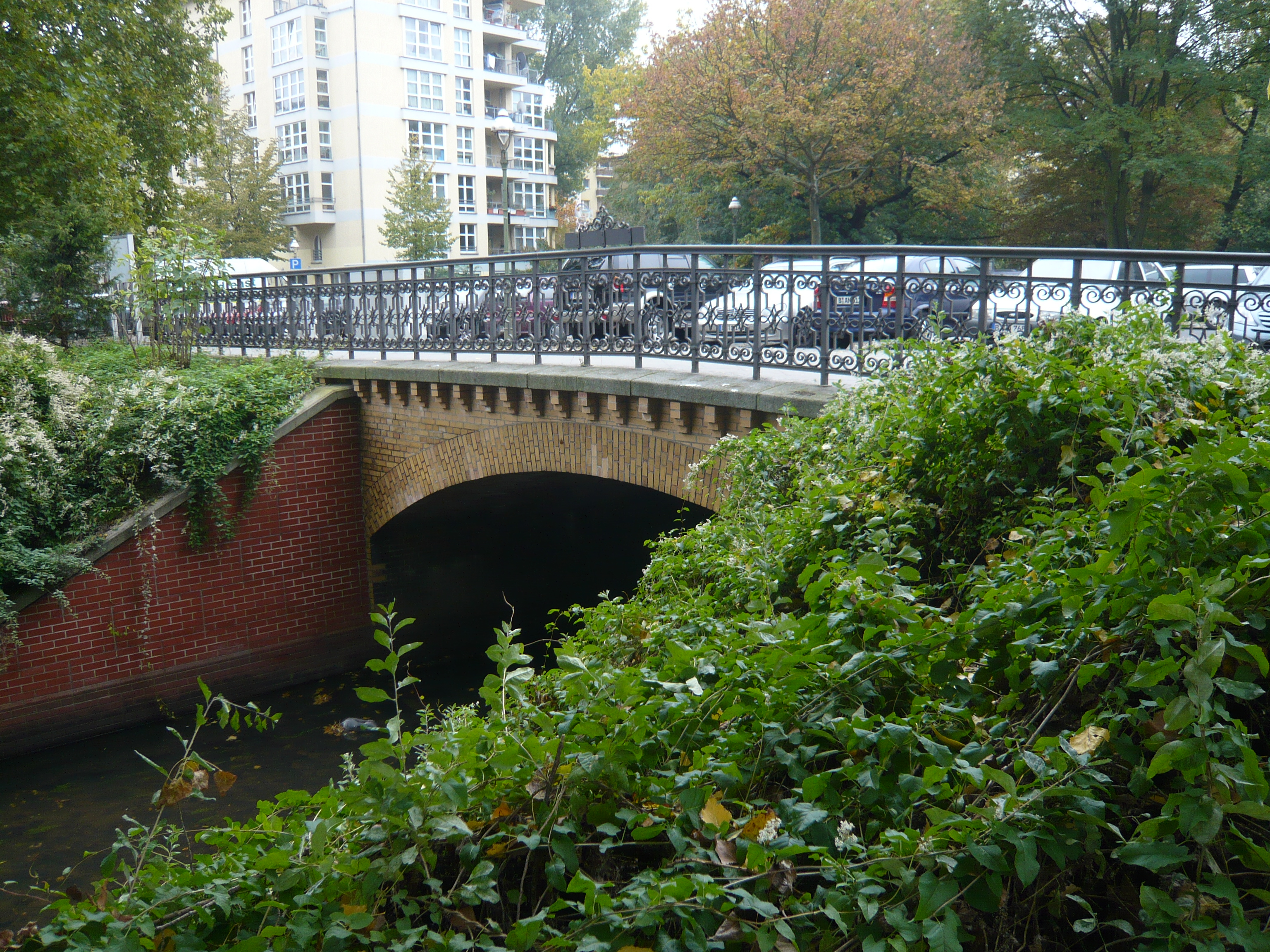 Schönwalder Straßenbrücke